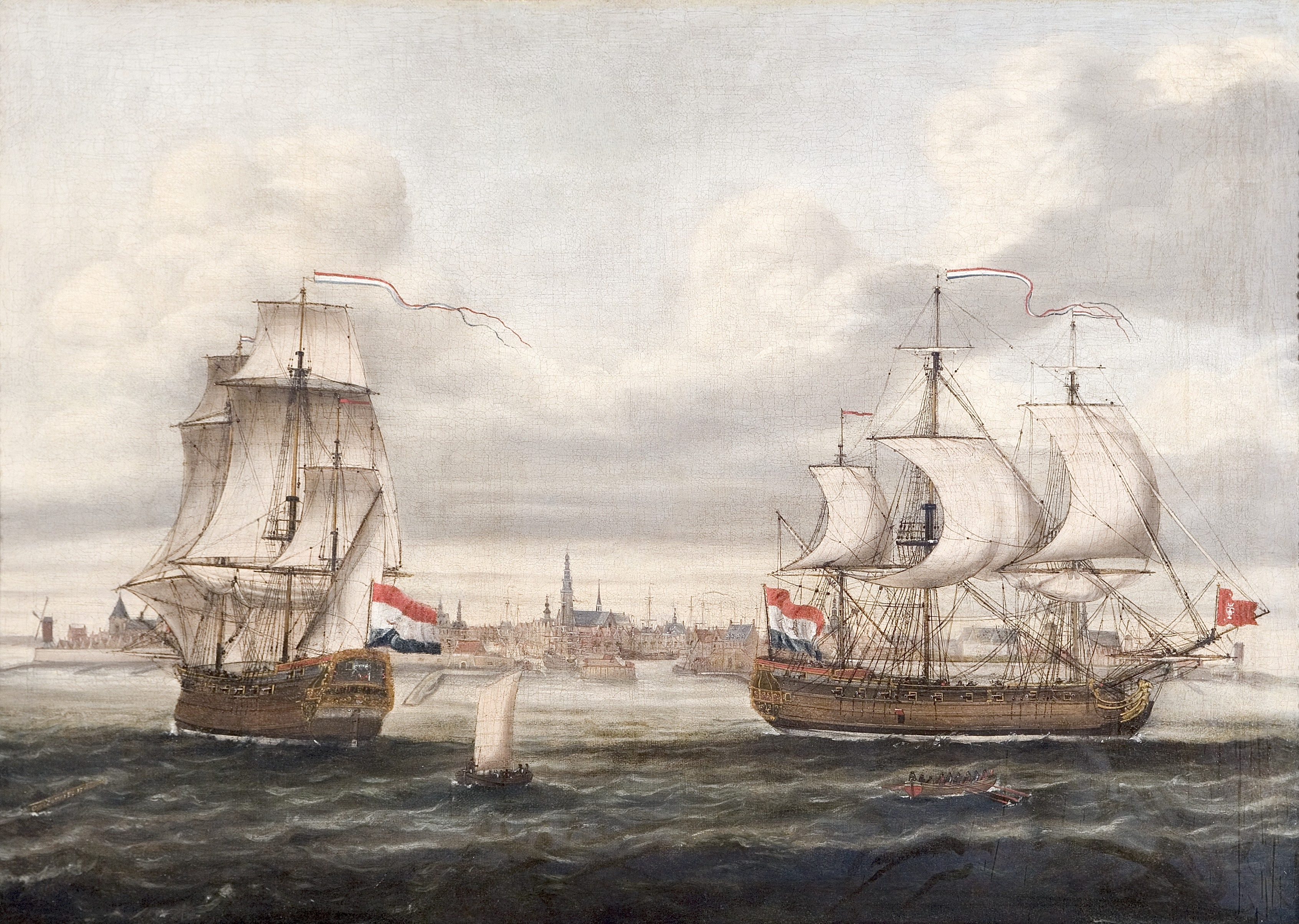 Na de Spaanse Succesieoorlog werden voormalige kapersschepen, vaak onder een nieuwe naam, ingezet voor de WIC. De Witte Bijle wordt genoemd in de admiraliteits archieven (Nationaal Archief, Archief Admiraliteit Zeeland 2539, Resoluties 23 juni 1714): Aanvraag van Turkse pas door boekhouder Jan de Witte voor Huybregt Godin voor de Witte Bijle, 80 last. De Witte vroeg op dezelfde dag ook een pas aan voor de Jonge Abraham, schipper Pieter Adriaanse. Beide schepen hadden West-Indie als bestemming. Het waren ook lorrendraaiers. Hijbrecht Godin vertrok in 1715 opnieuw, ditmaal met de lorrendraaier (slavenhaler) El Porto Prince. De Witte Bijle wordt verder niet meer genoemd en is daarna omgedoopt als El Porto Prince in de smokkelhandel actief geweest. In 1721 wordt het schip 'genomen' door piraten en verdwijnt uit de archieven. Bron: Ruud Paesie